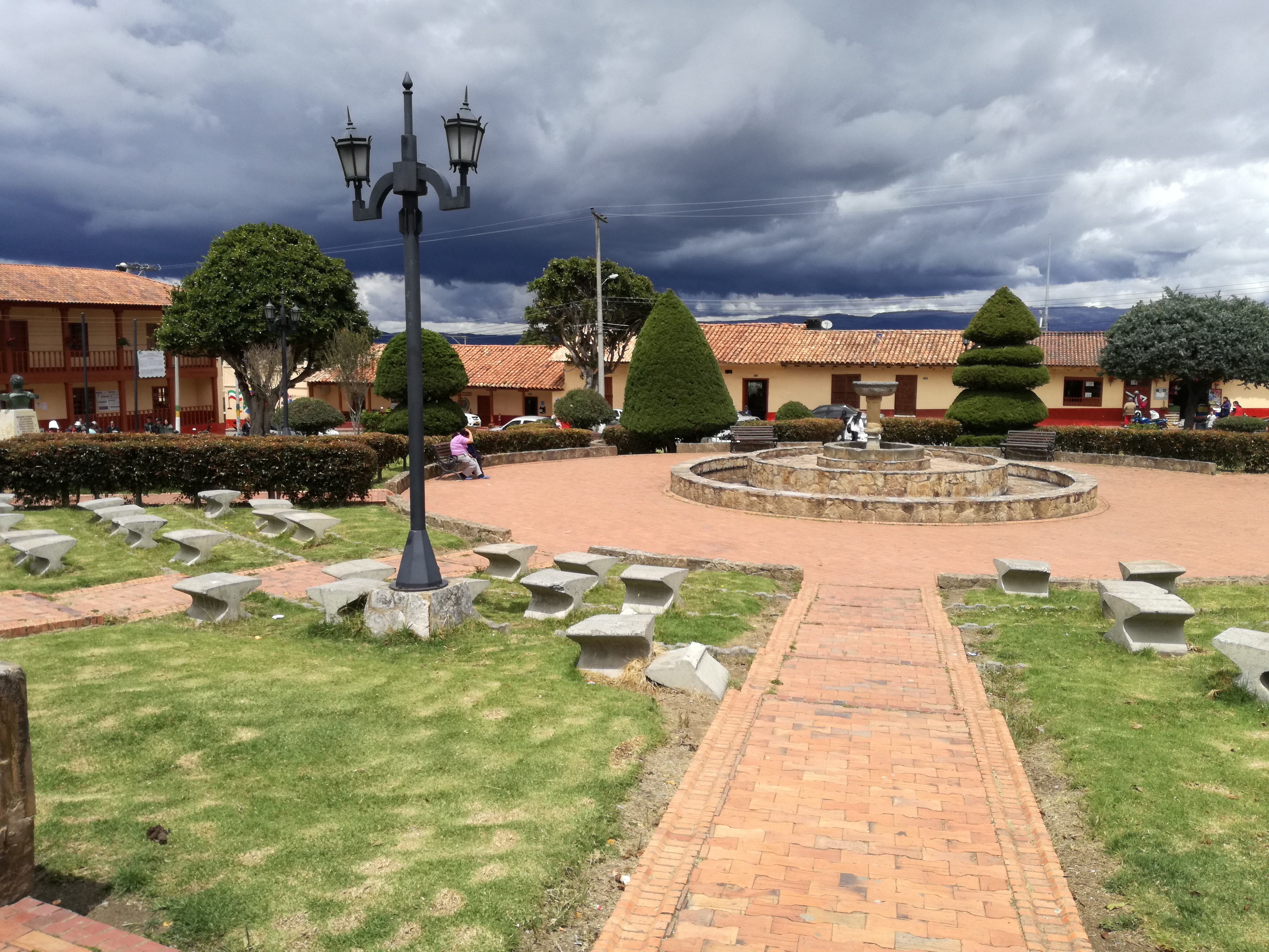 panorámica de la cabecera Municipal